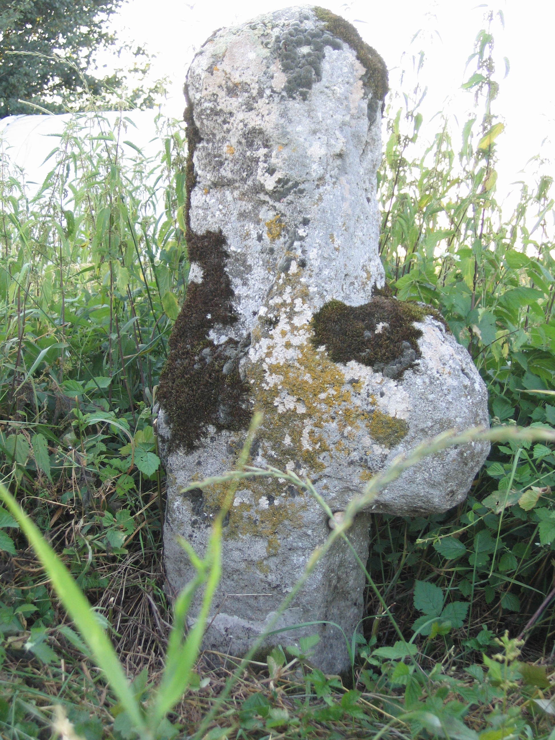 Steinkreuz südwestl.v.Hürbel b.Geslau/Mfr.